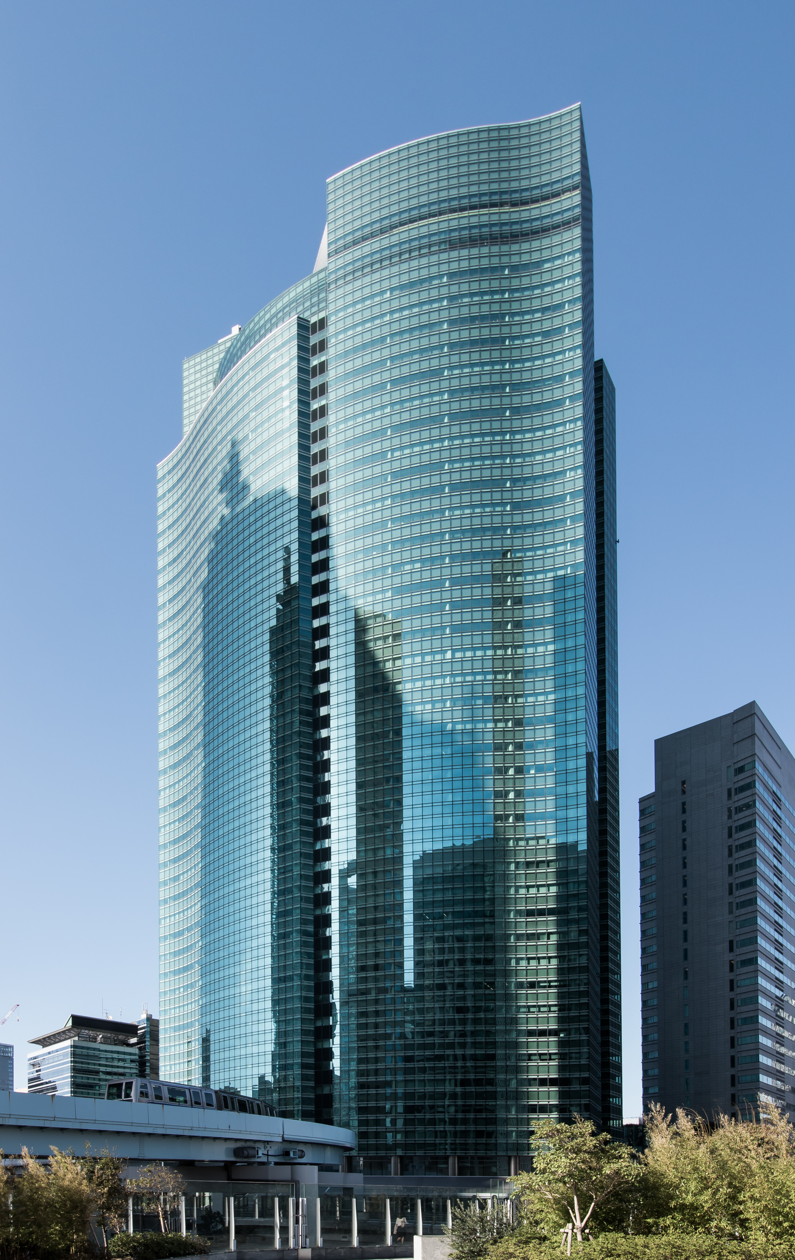 汐留シティセンター（東京都港区）